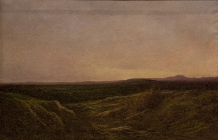 Camps de Sinéu